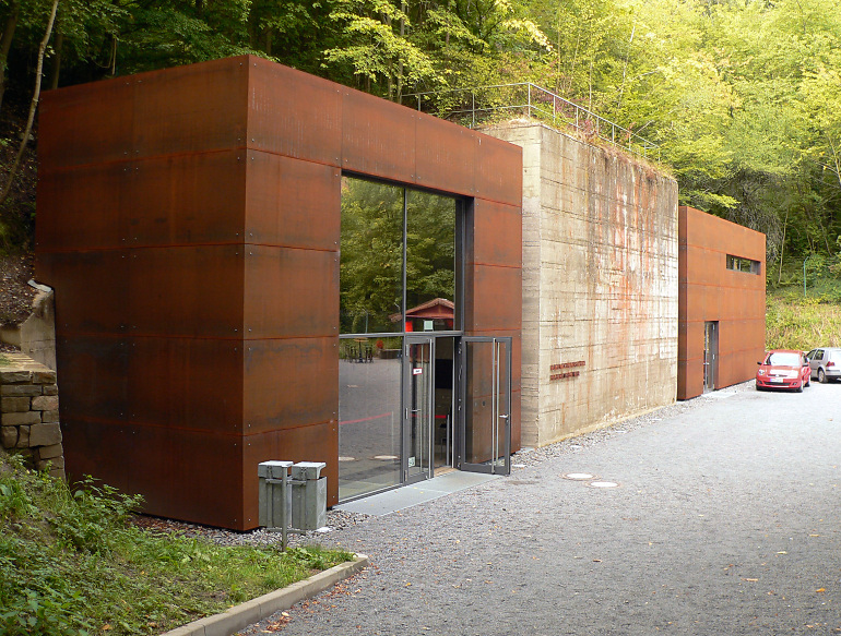 Eingang Dokumentationsstätte Regierungsbunker